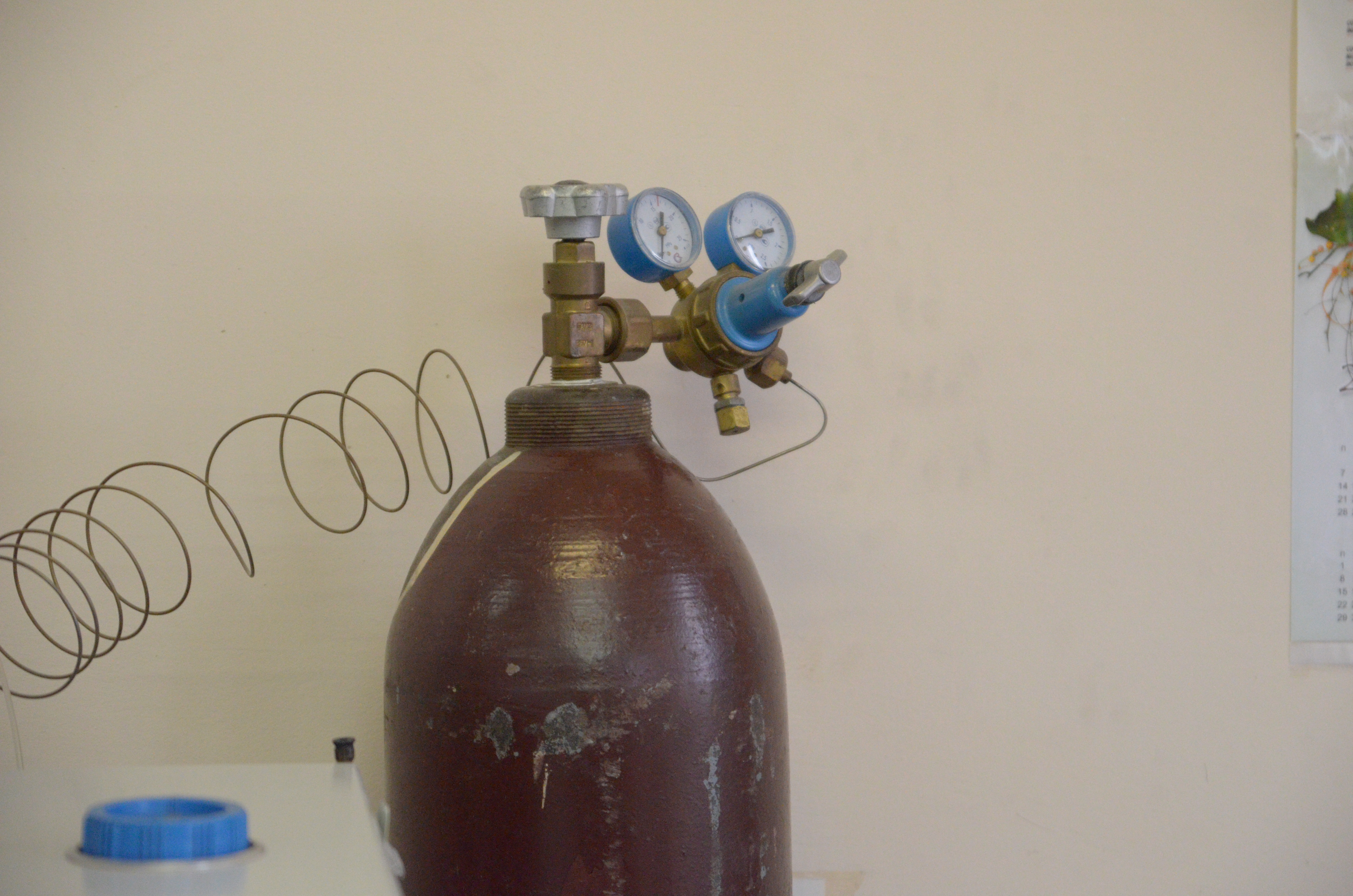 Химический факультет Донецкого национального унивеситета